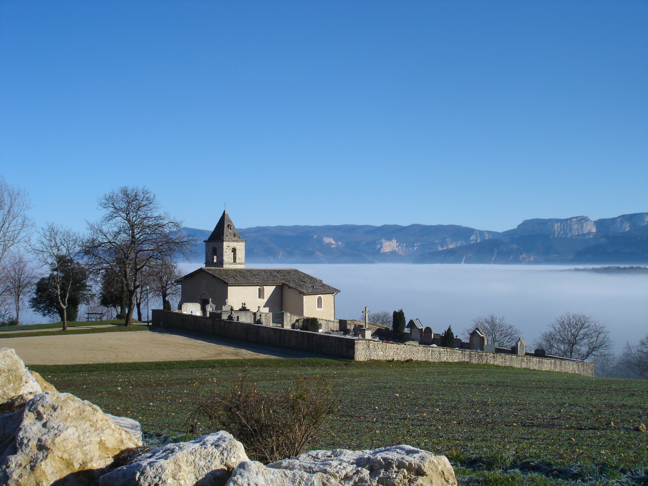 Eglise de Rochechinard, dans la Drôme.